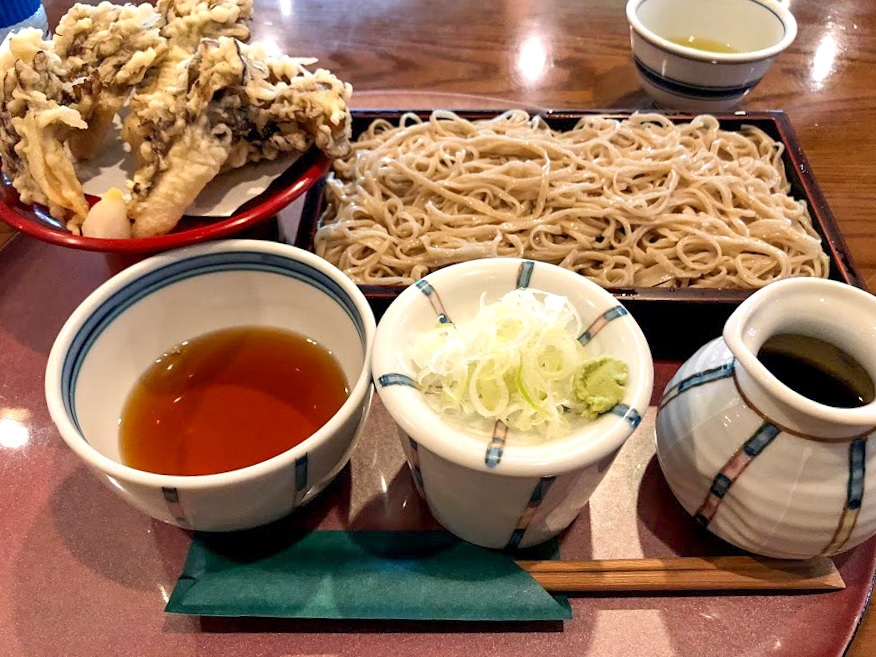 秩父そば ざるそば